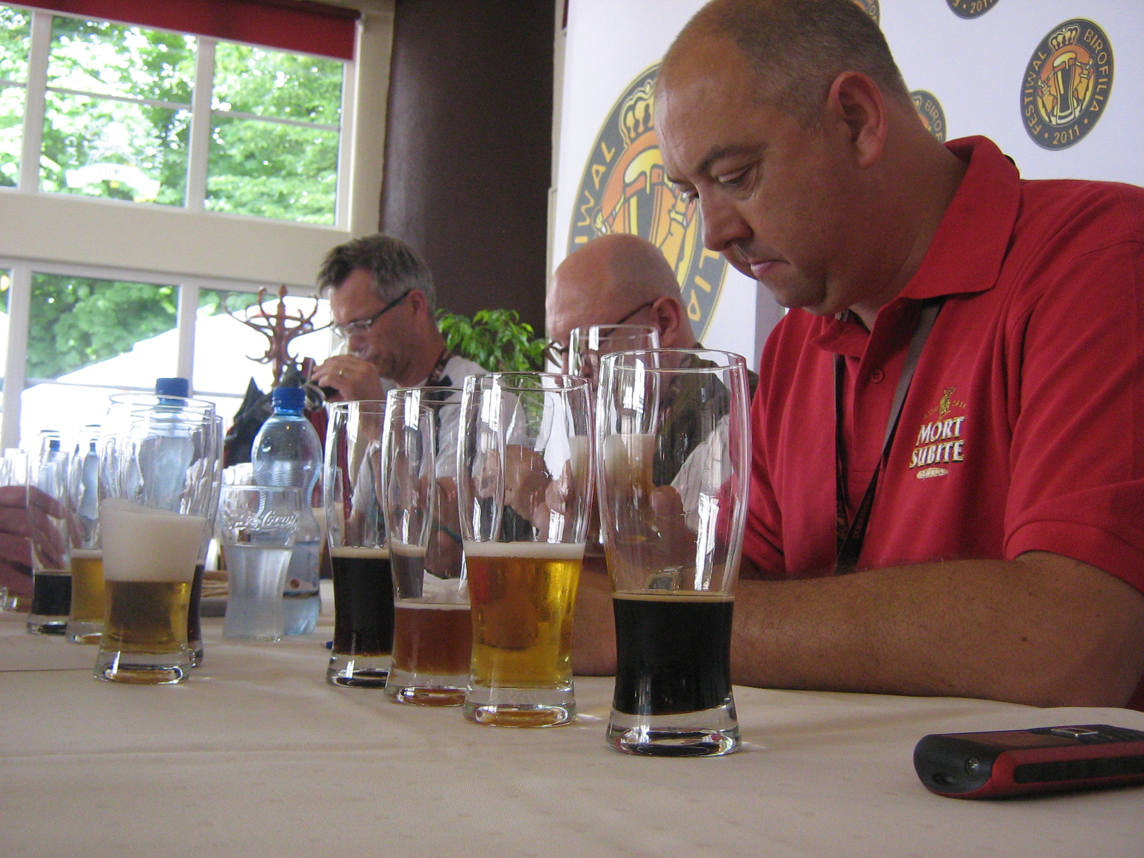 Z lewej Bruno Reinders (Browar Mort Subite, Belgia)